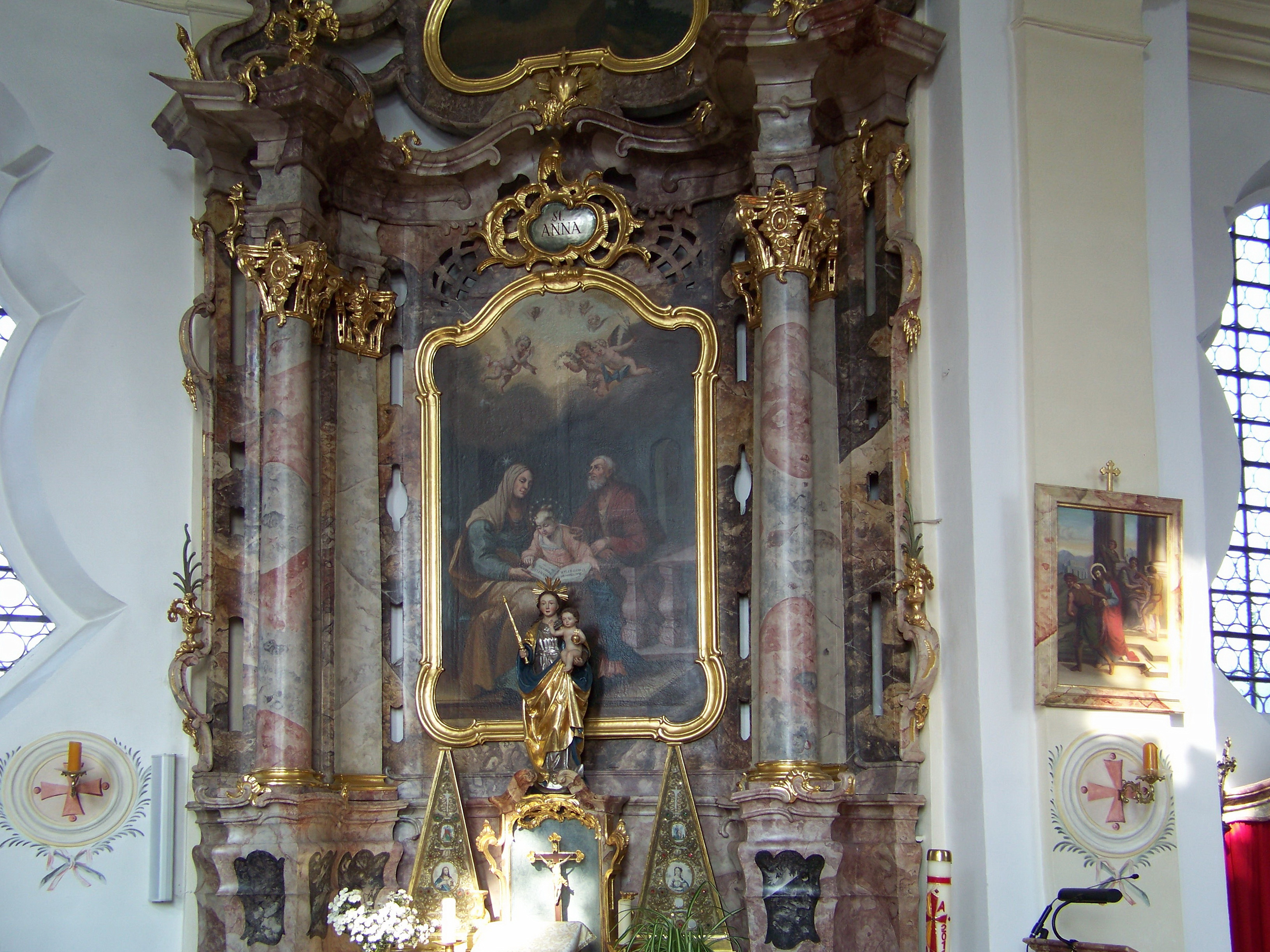 Neufahrn in Niederbayern. Hofendorf 28. Filialkirche St. Andreas. Saalkirche mit eingezogenem Chor und Westturm, Gliederung durch Lisenen und Putzbänder, Westturm mit Geschossgliederung, Achteckaufsatz und Zwiebelkuppel, 1747 von Johann Georg Hirschstötter; mit Ausstattung. Der linke Seitenaltar ist St. Anna geweiht.